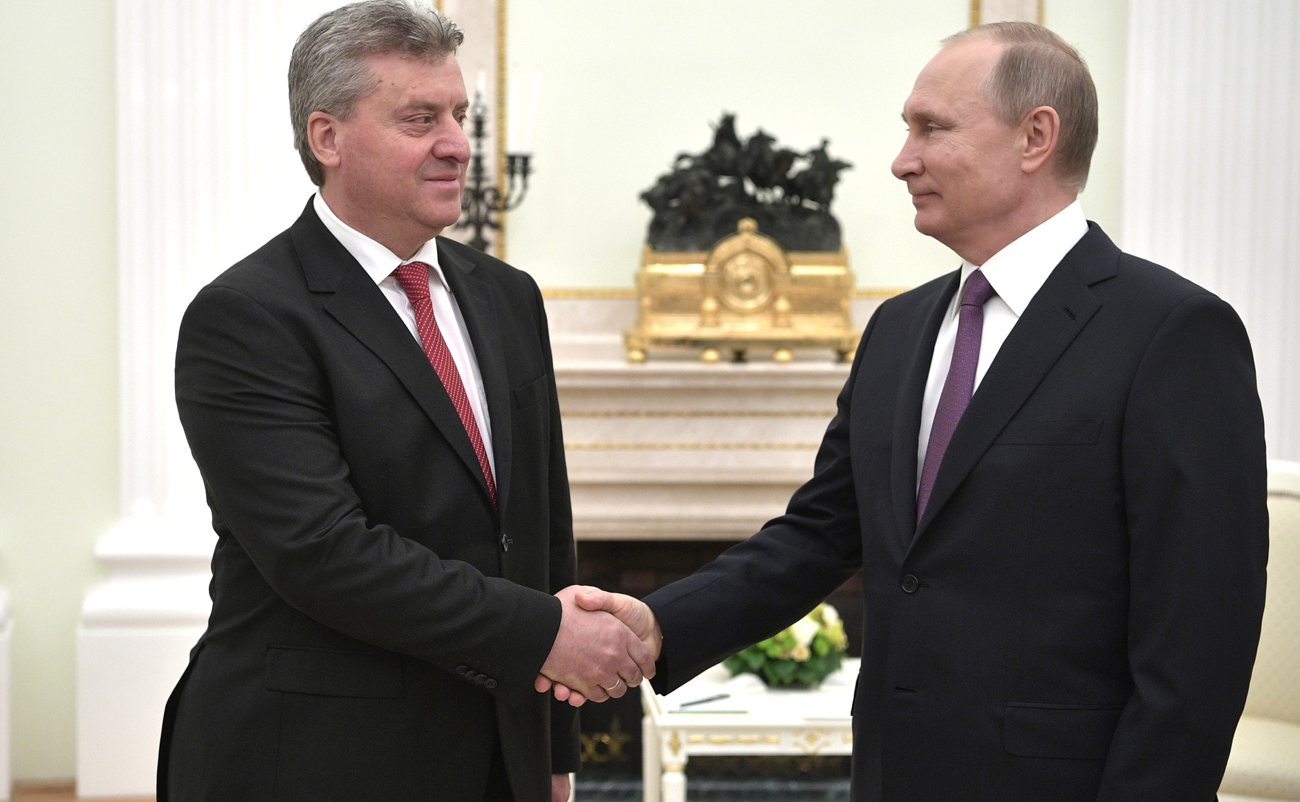 Встреча Президента России Владимира Путина с Президентом Македонии Гёрге Ивановым